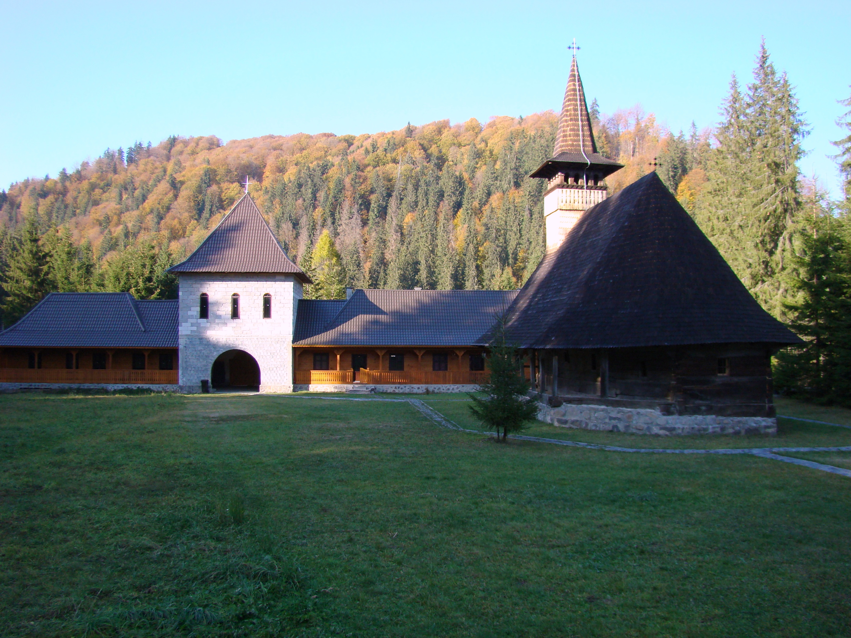 Biserica de lemn "Sfântul Nicolae", sat LĂPUŞNA; comuna IBĂNEŞTI